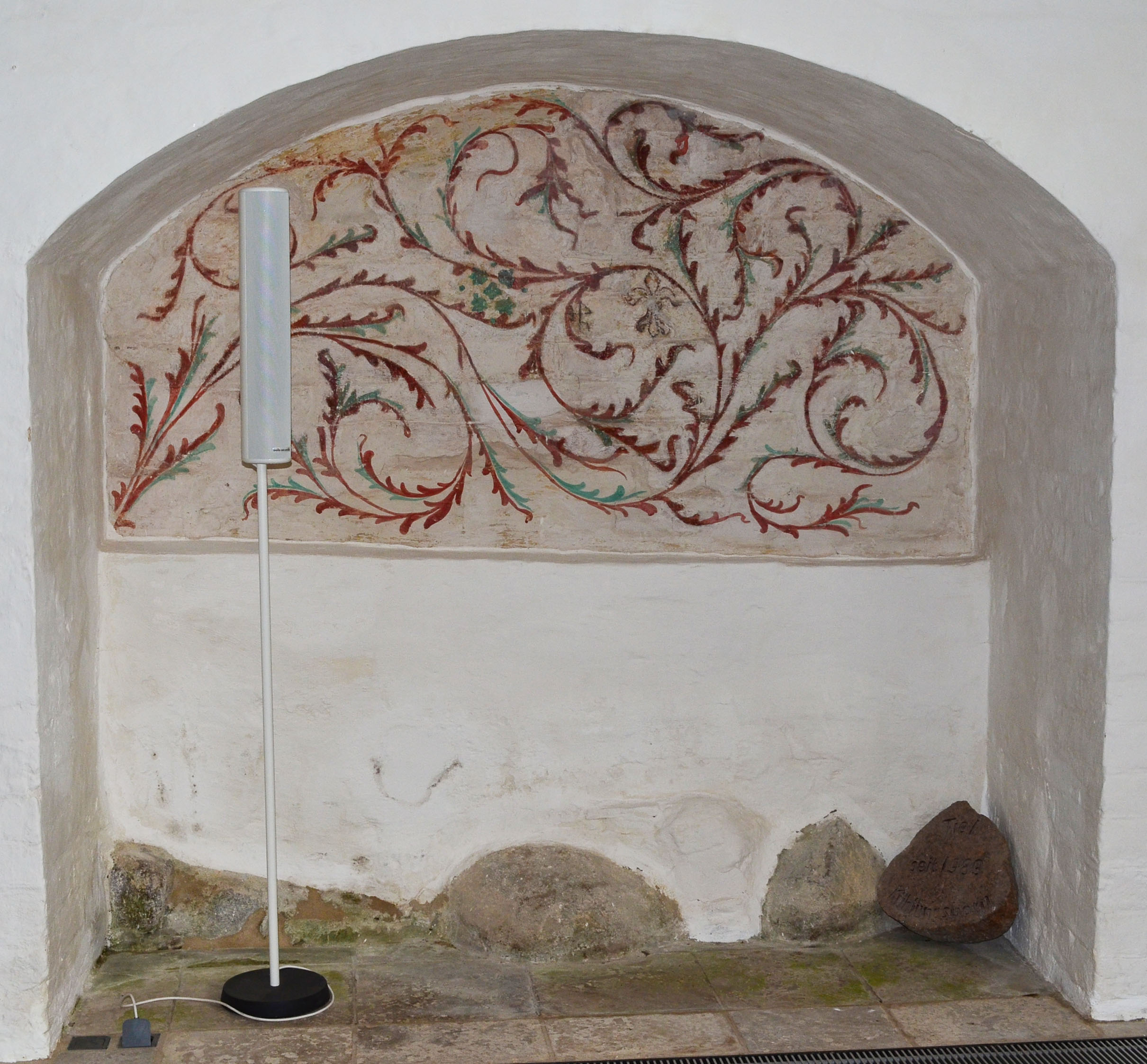 Kühlungsborn, Schlossstraße, ev. Johanniskirche, ursprüngliche Ausmalung der Kirche